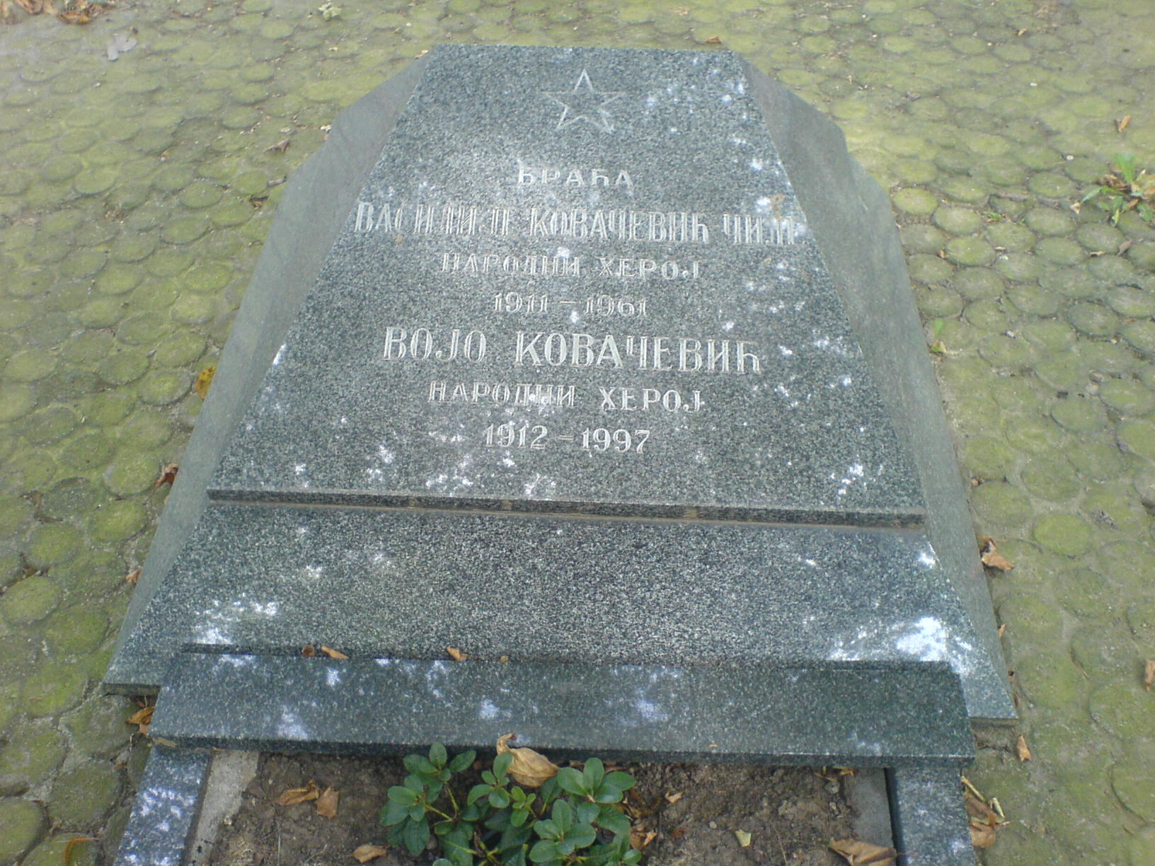 Grob brace Kovacevic